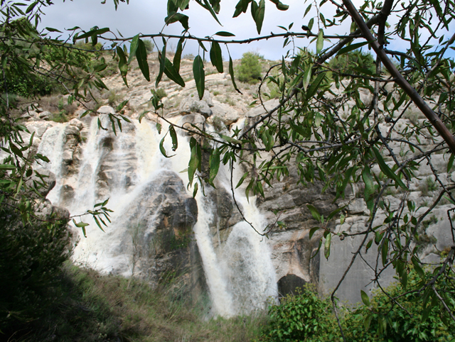 Vista de la cascada del Fanalic (Abdet) tras unas lluvias intensas